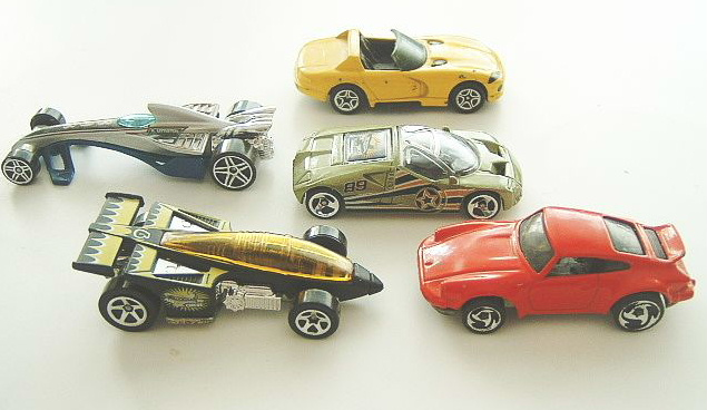 Spielzeugautos diverser Hersteller, Toy-Cars. Selbst fotografiert am 10.10.2005